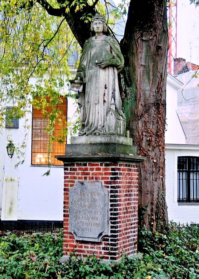 Johanna van Constantinopel in het begijnhof te Kortrijk - eigen foto